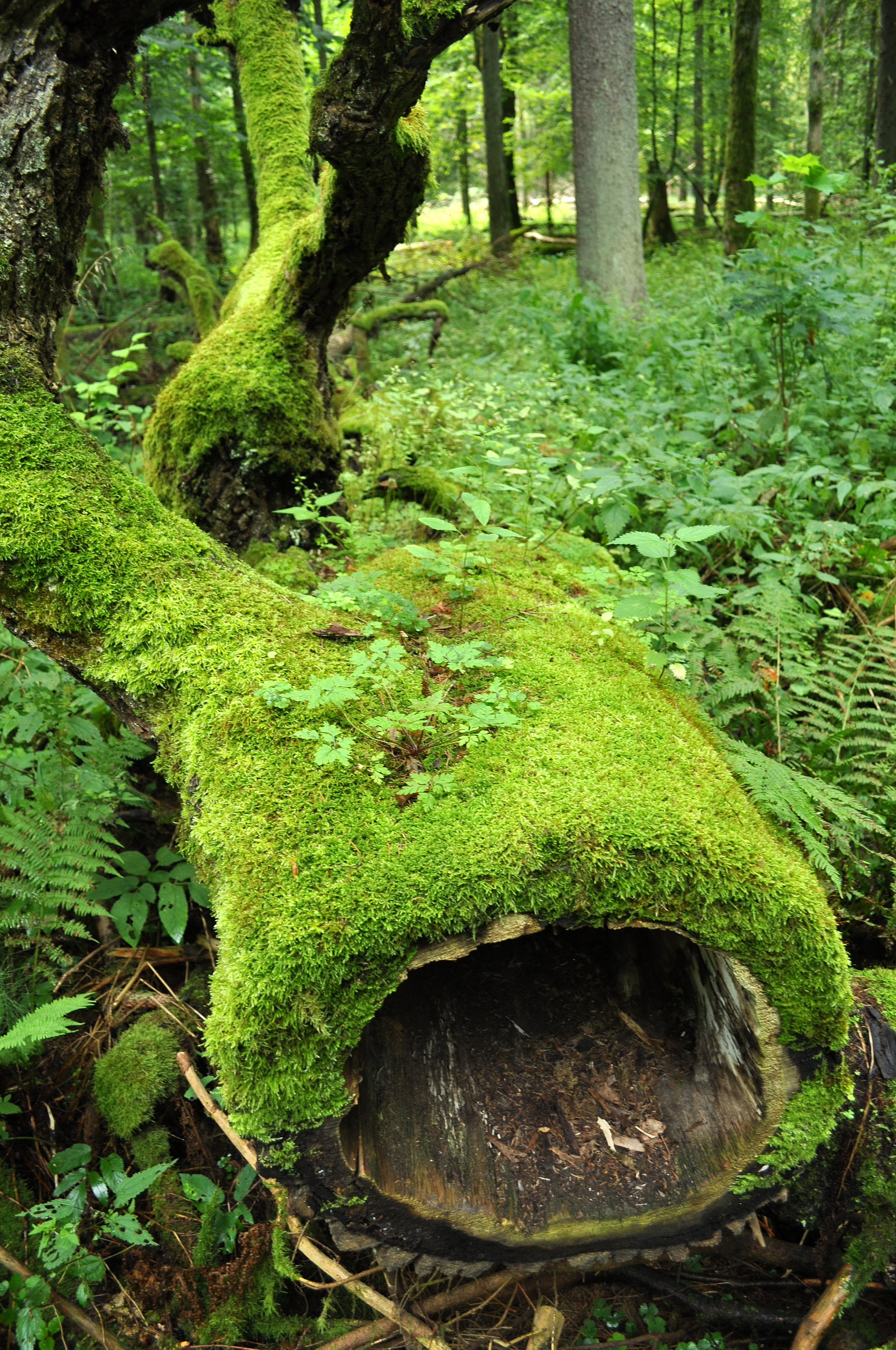 Białowieski Park Narodowy